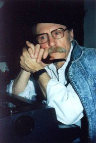 Cunha de Leiradella: Escritor Descrição: (Cunha de Leiradella: Escritor) Fonte e créditos: (Cunha de Leiradella) Licença